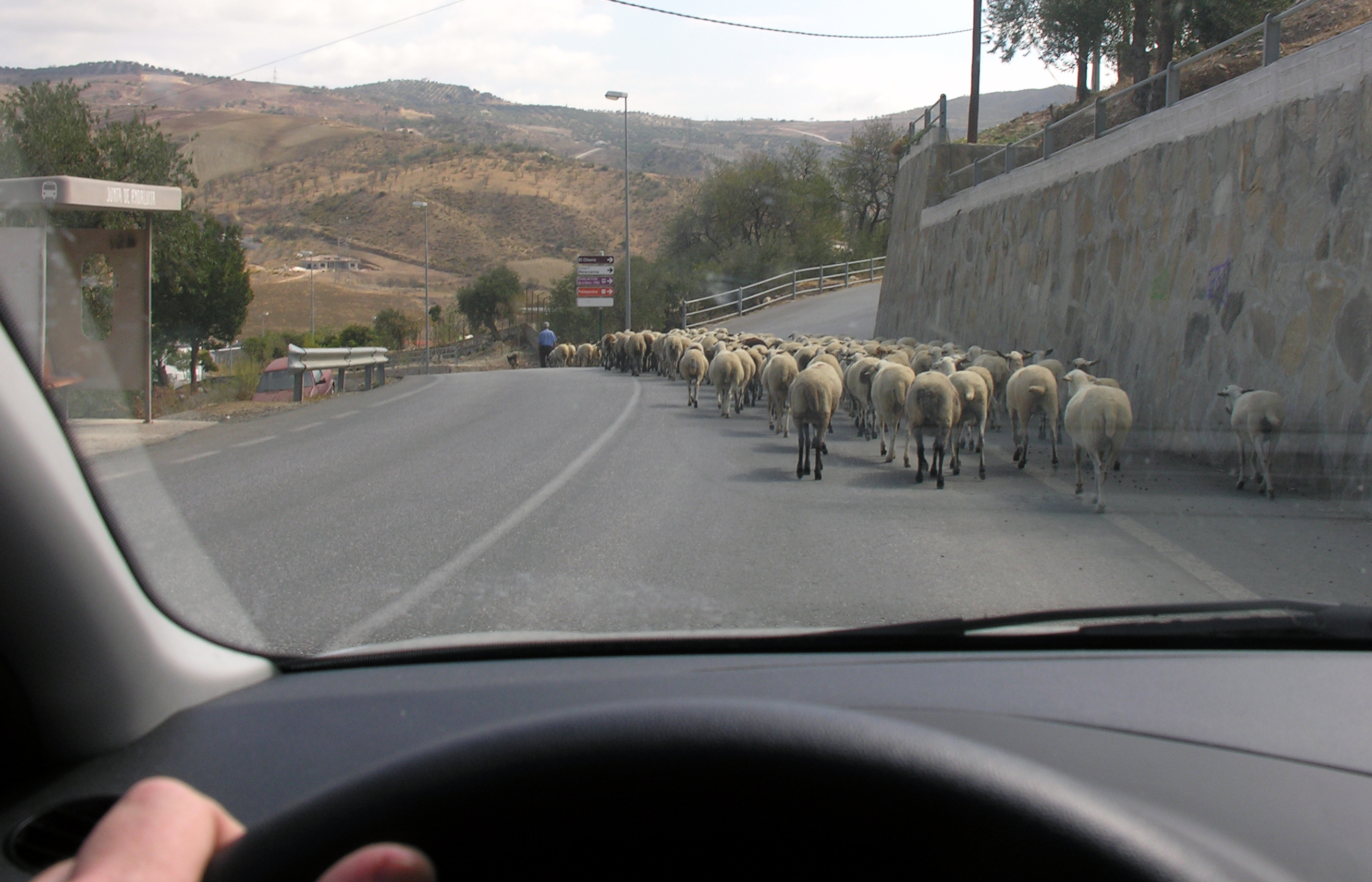 Sheeps in Valle de Abdalajís, Spain.